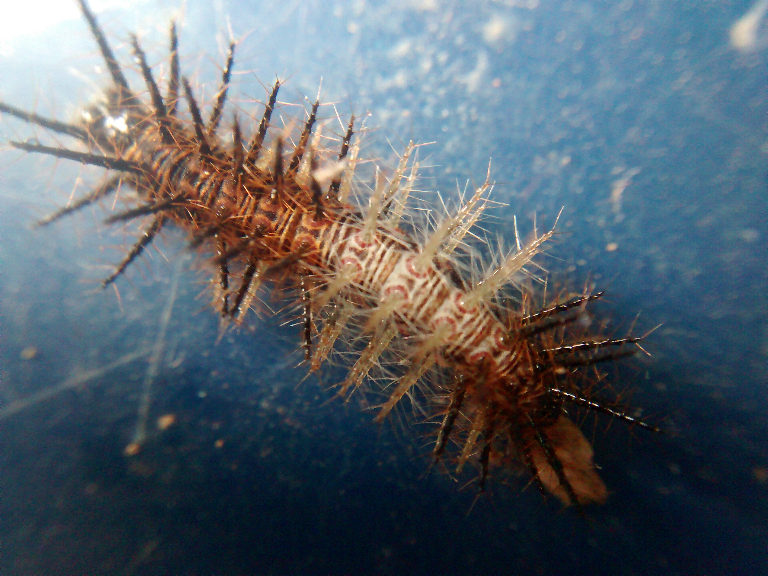 lagarta de Actinote